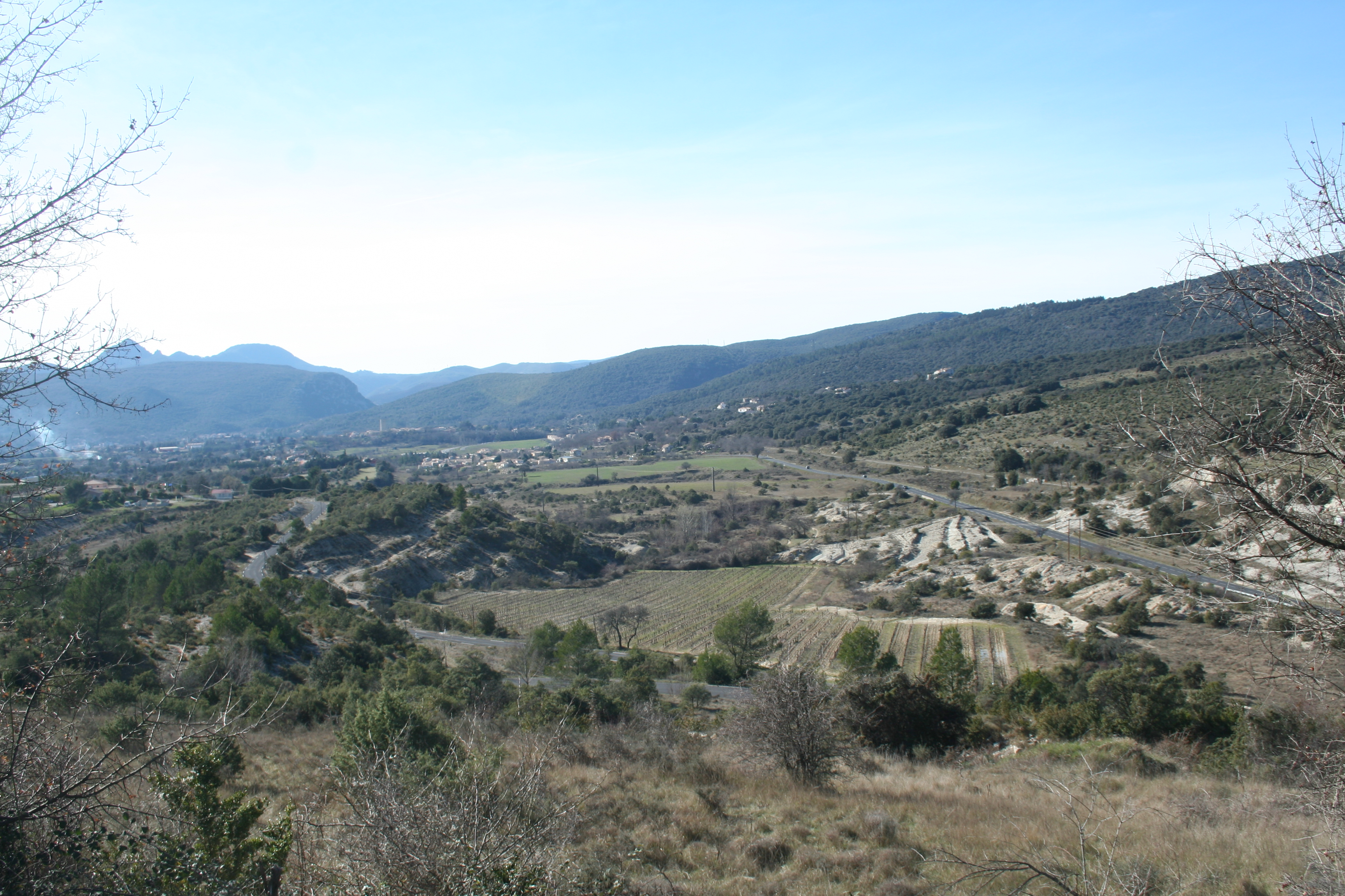 Moulès-et-Baucels (Hérault) - vue